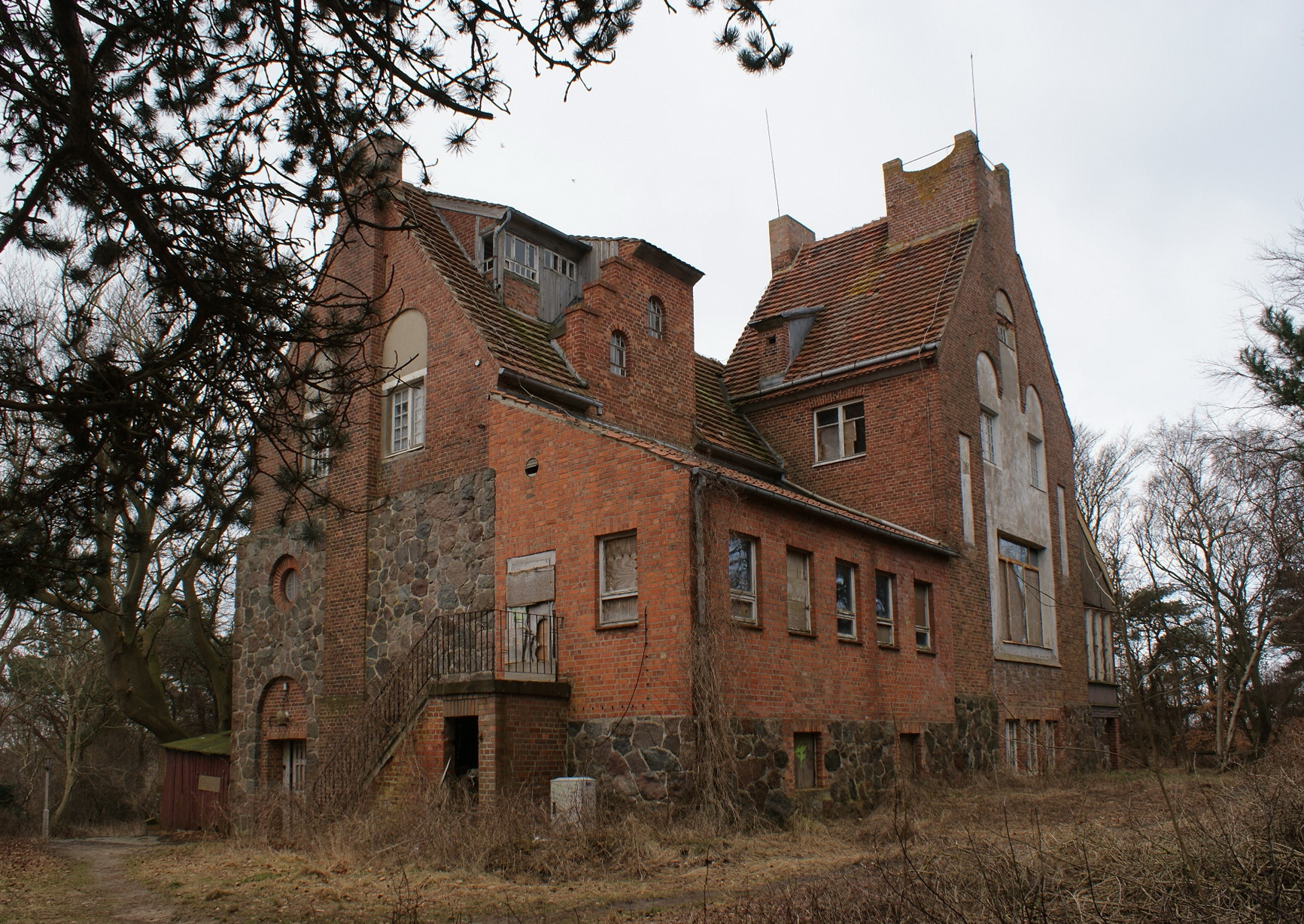 Baudenkmal Kloster (Hiddensee), Zum Hochland 13, Lietzenburg